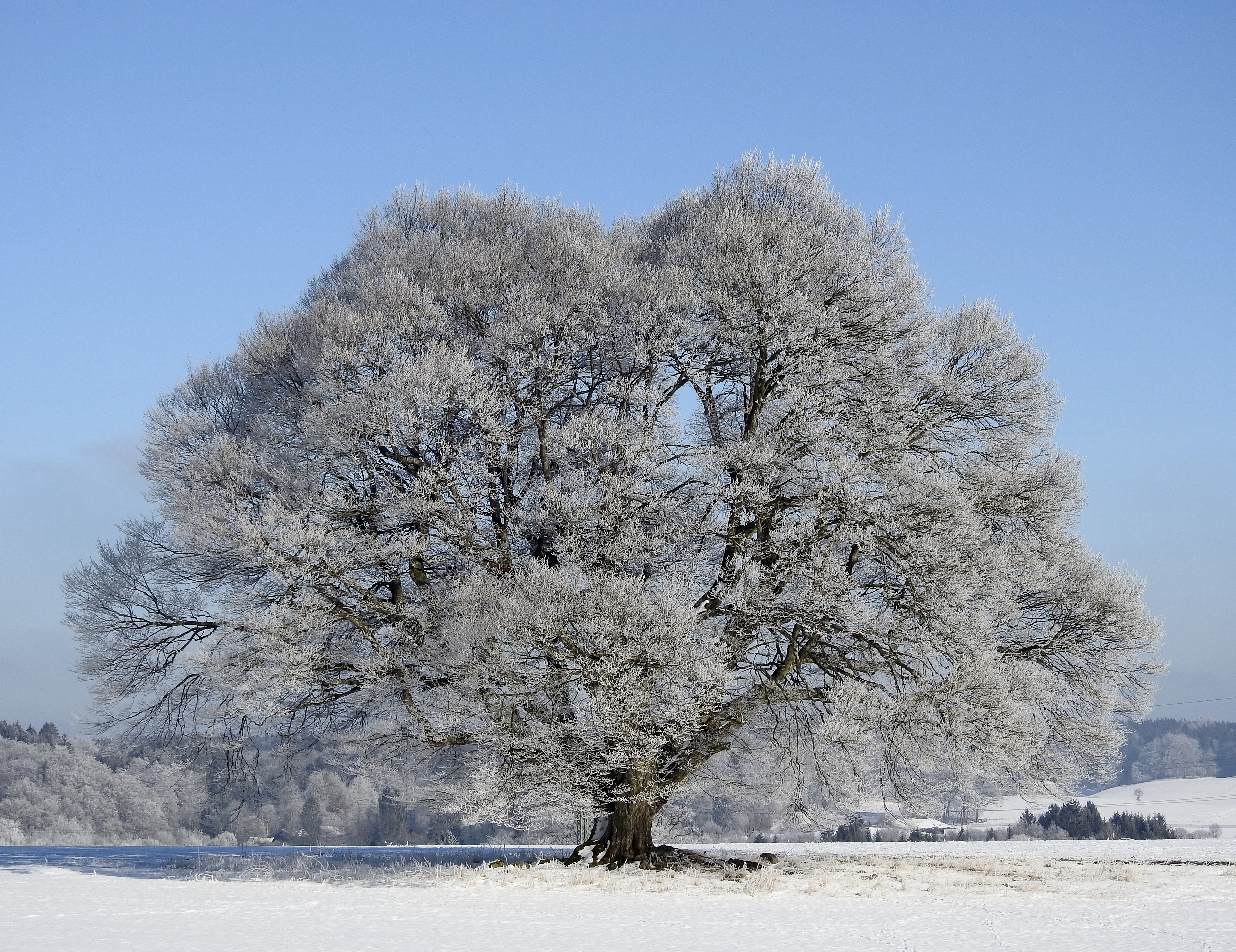 Starnberg, OT Perchting. Hainbuche in Jägersbrunn. Landschaftsschutzgebiet „Westlicher Teil des Landkreises Starnberg“ (LSG-00542.01).